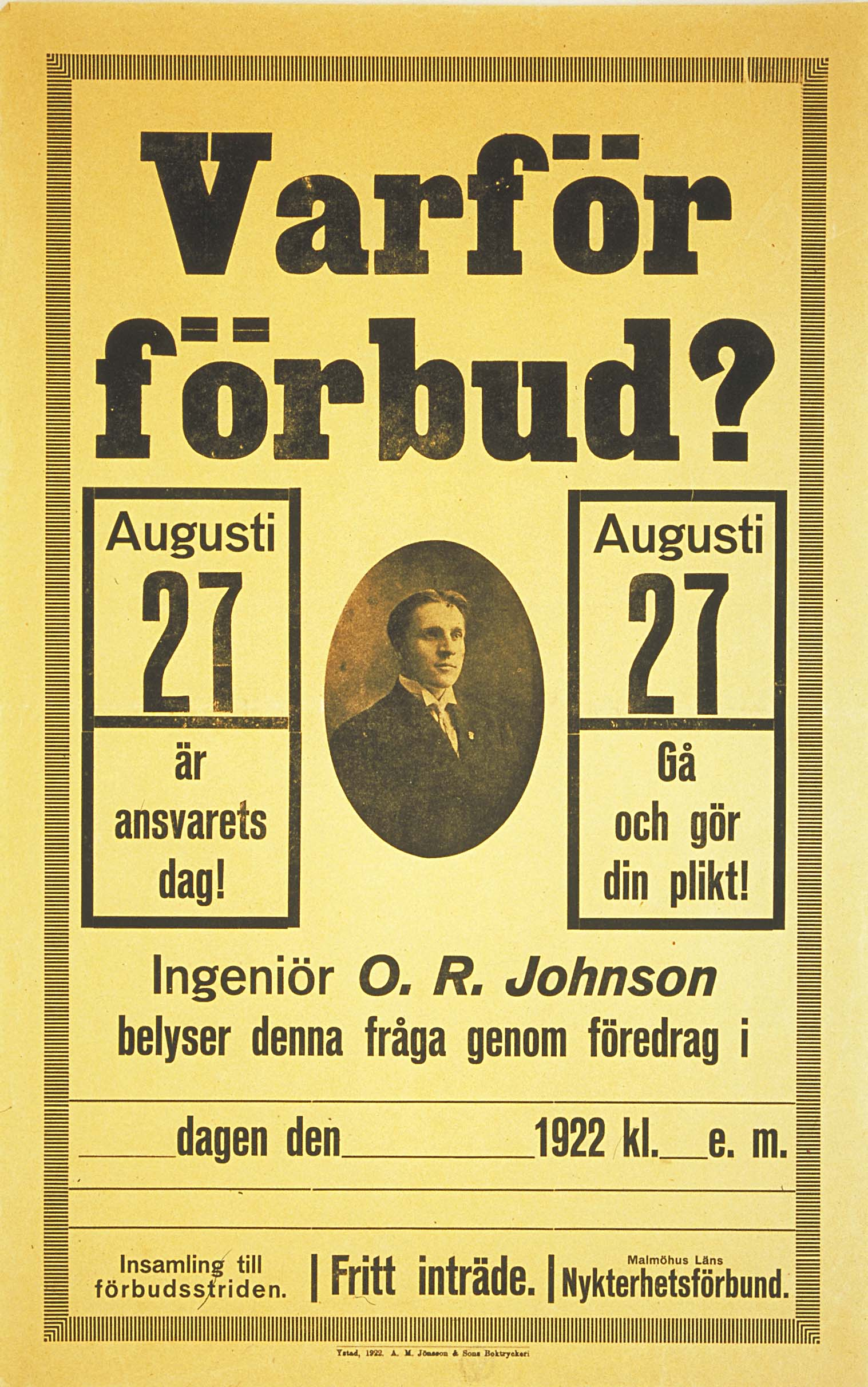 Affisch, Valaffisch, Propaganda, Nykterhet